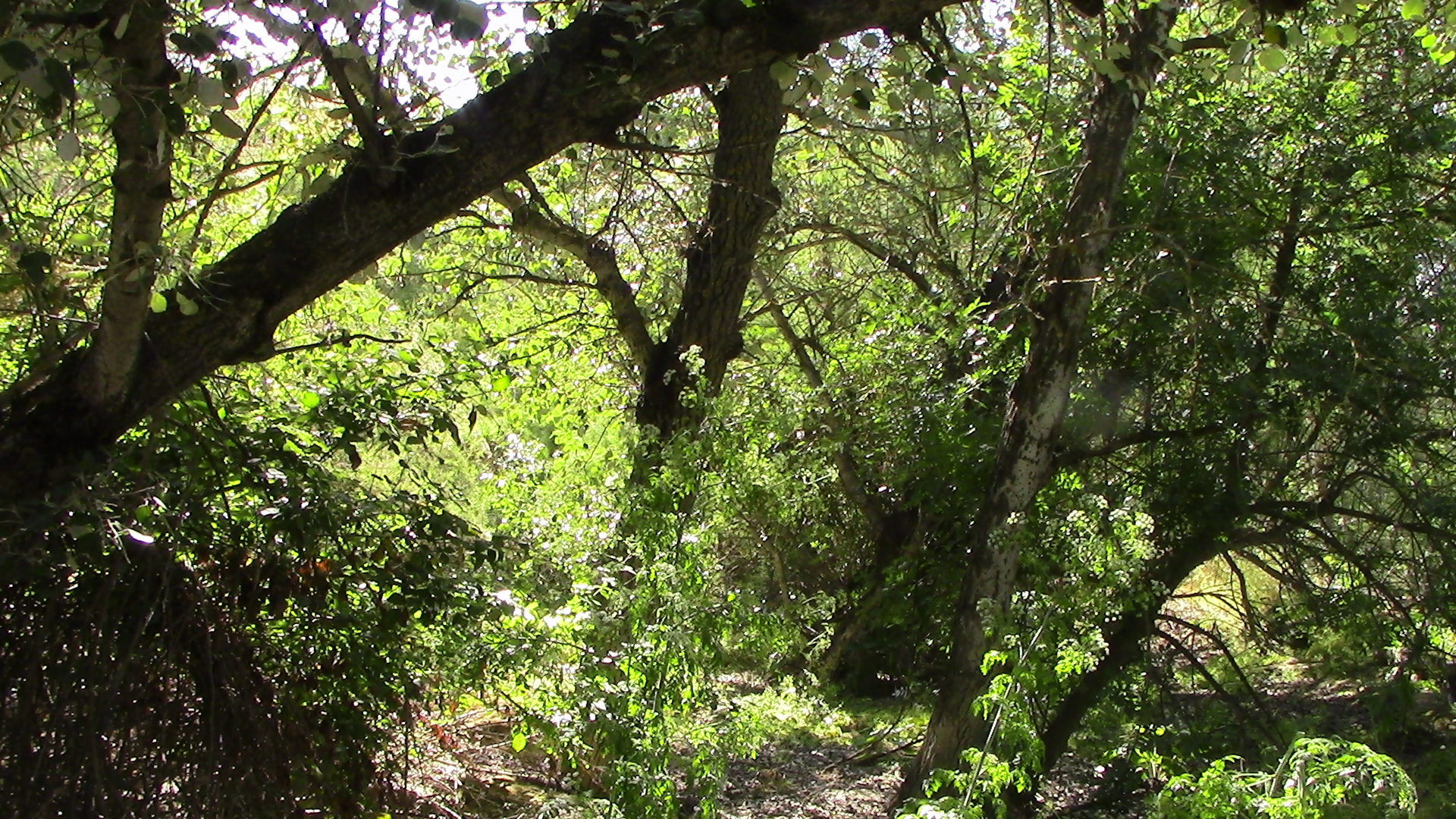 El Paraje Natural "Alto Guadalquivir", es un tramo del río del mismo nombre, que discurre entre los Términos Municipales de Peal de becerro, Úbeda, Puente del Obispo, Sotogordo, y varios pueblos más de la Provincia de Jaén. This is a photography of a Special Area of Conservation in Spain with the ID: ES6160002. Natura2000 entry, EEA entry